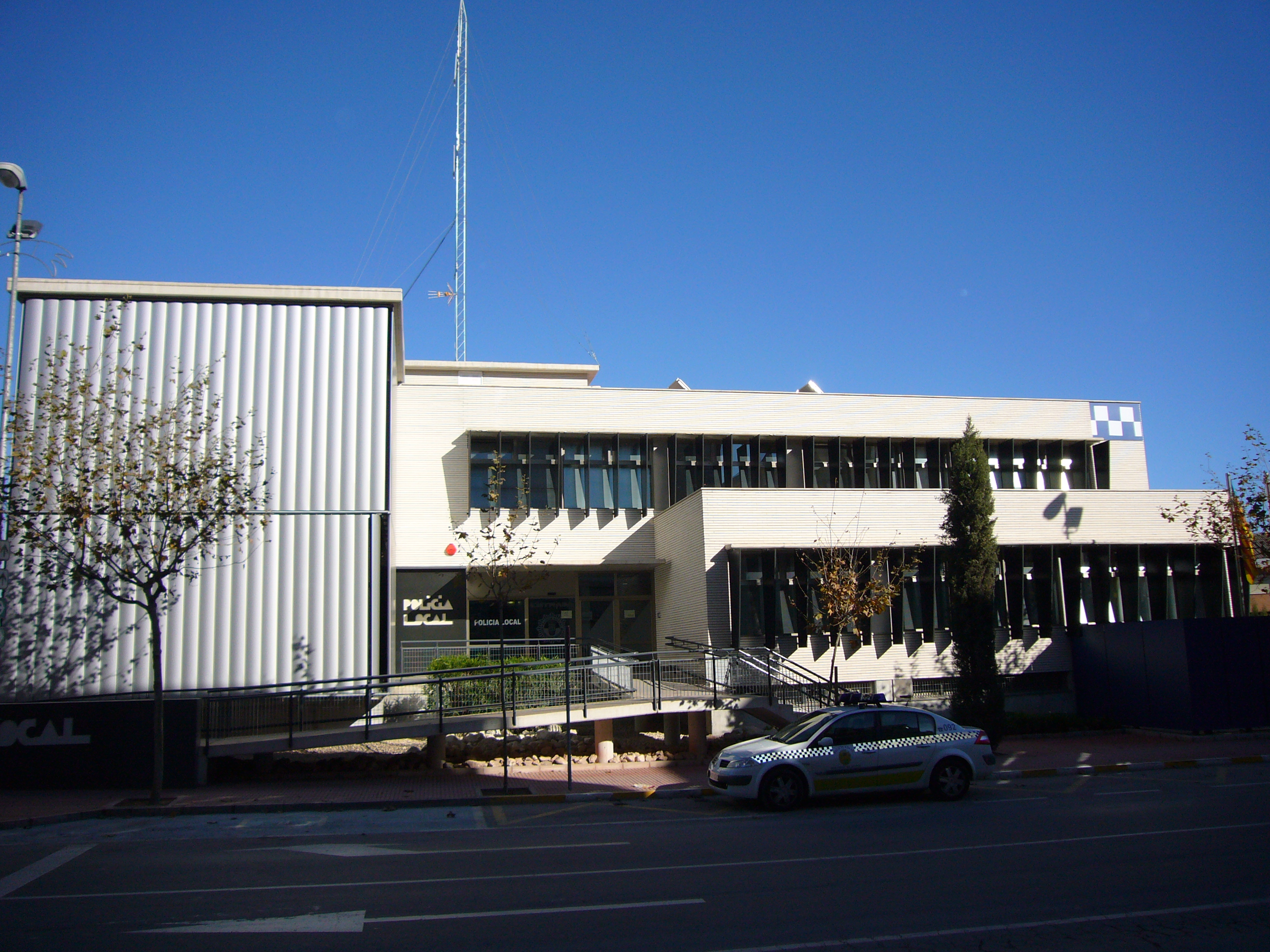 Cuartel de la Policía Local de San Vicente del Raspeig (Alicante).